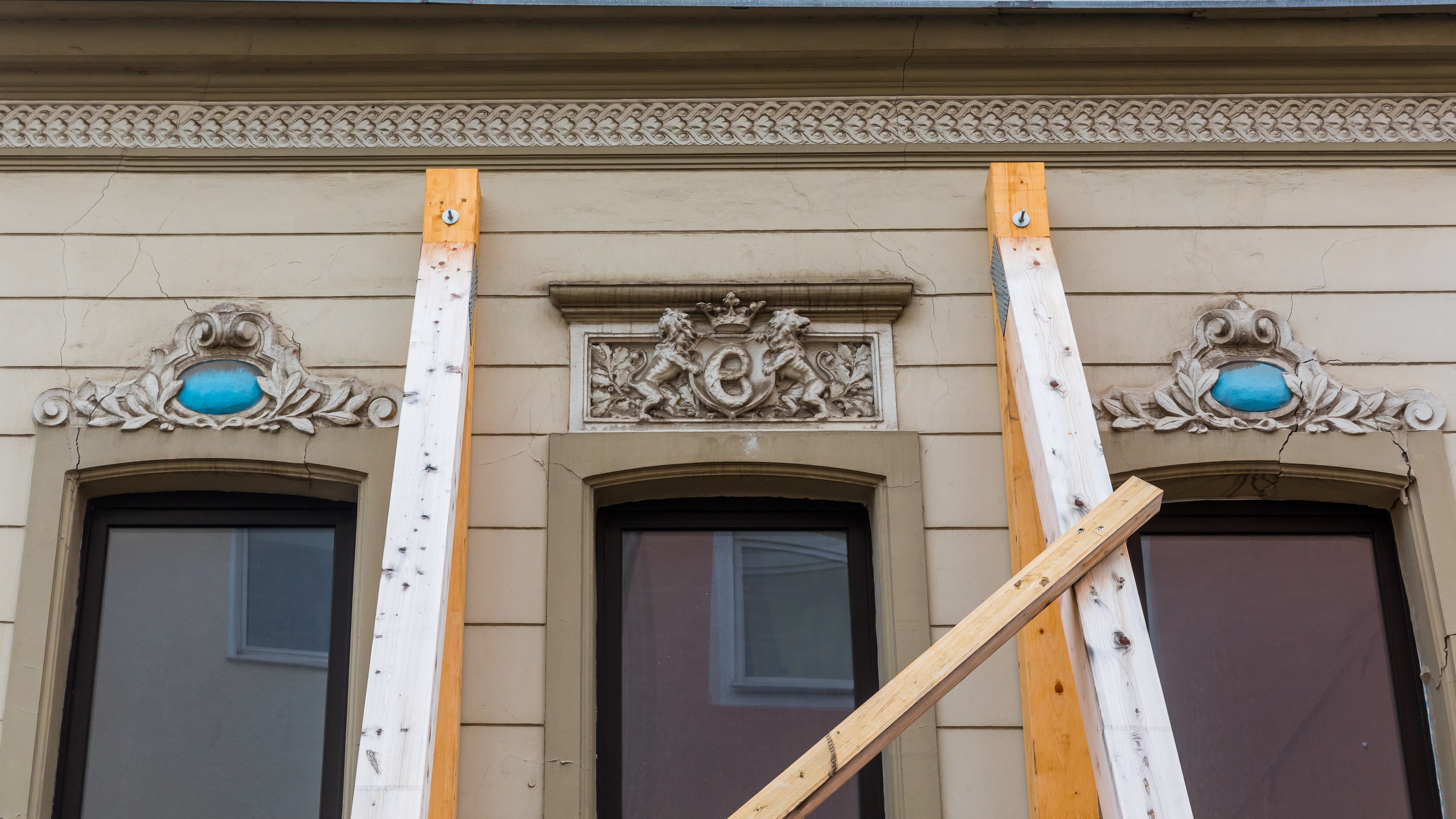 Wohn- und Geschäftshaus Hansemannstraße 2, Köln-Ehrenfeld